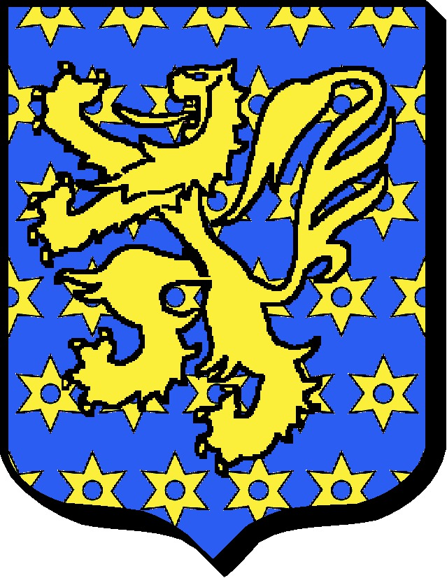 D'azur, semé de molettes d'or, au lion de même brochant.